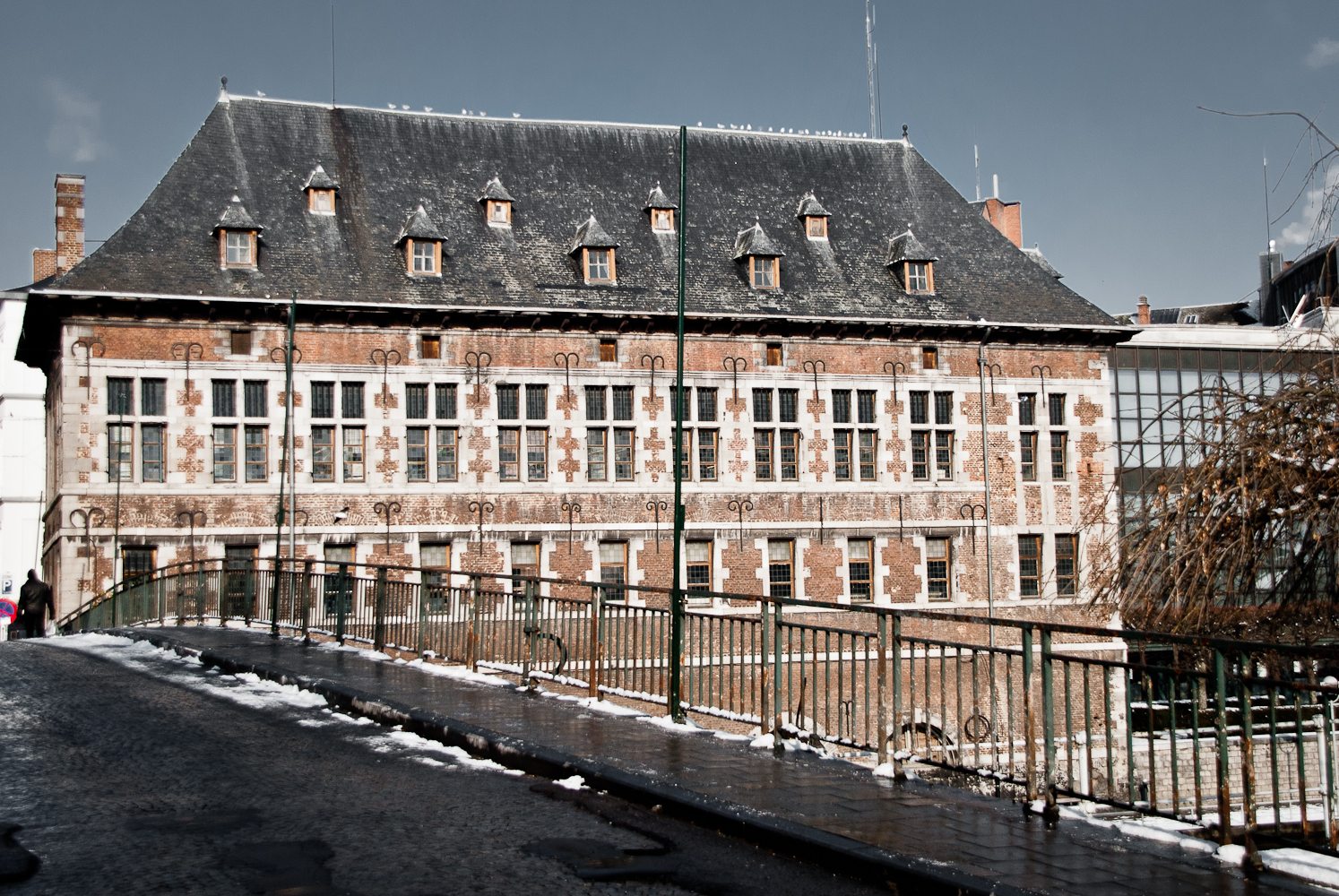 L'ancienne halle à la Chair